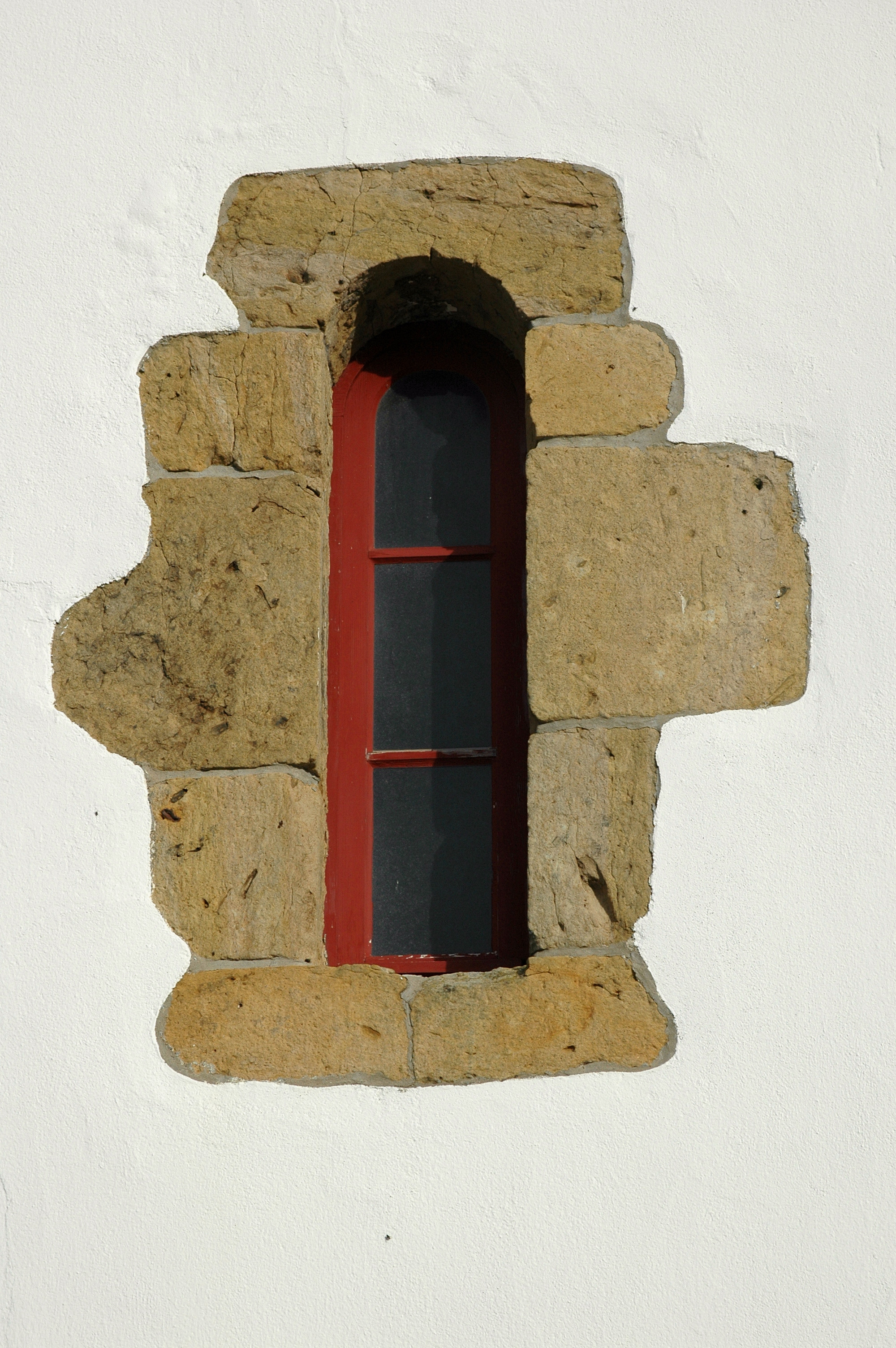 Jatxou, détail d'une fenêtre de l'église Saint-Sébastien. Photo prise le 31/12/06 par Harrieta171